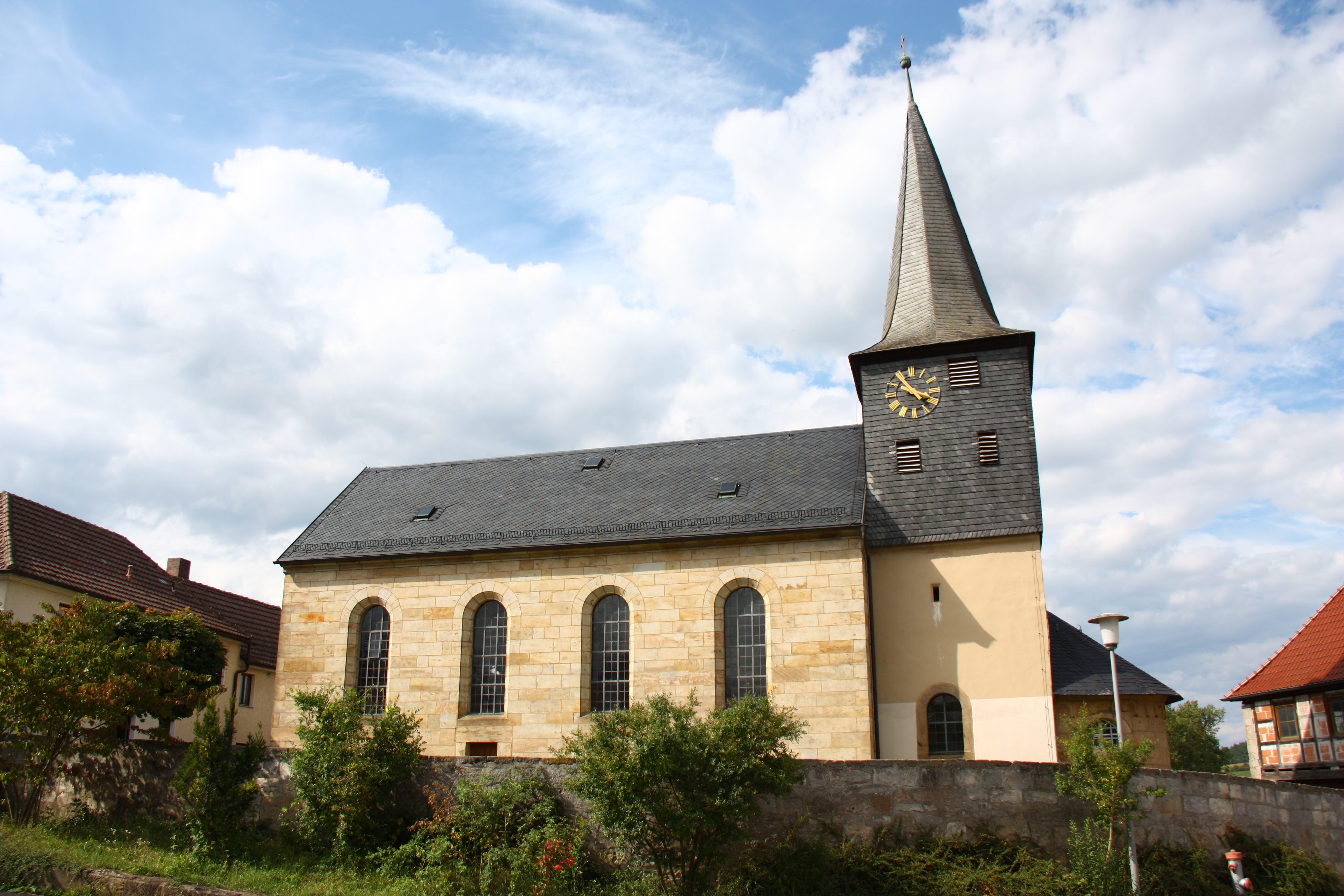 Kath. Kuratiekirche Allerheiligen Maineck